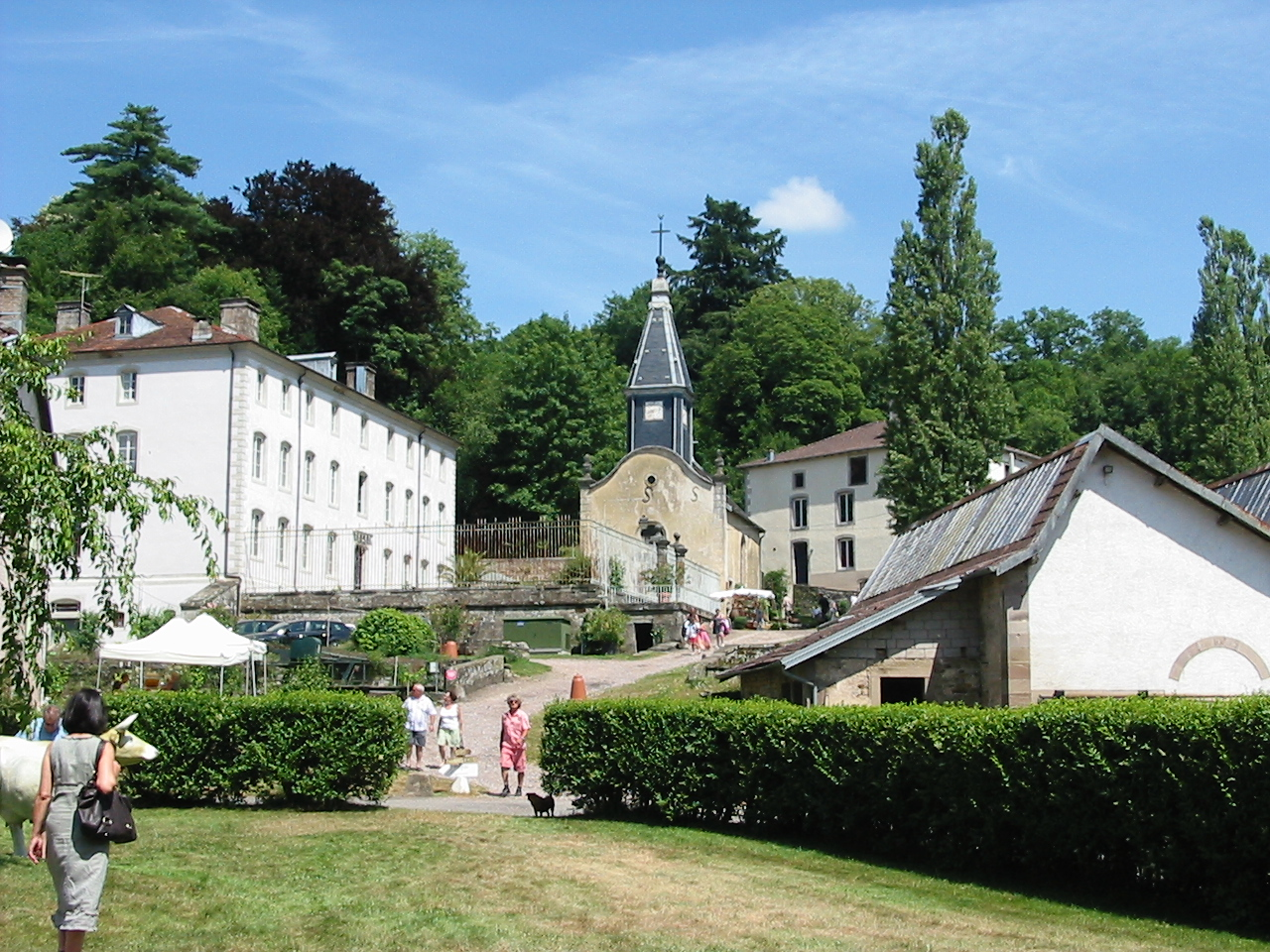 Manufacture Royale de Bains-les-Bains, dans les Vosges. Object location 47° 59′ 49.46″ N, 6° 13′ 59.97″ E This and other images at their locations on: Google Maps - Google Earth - OpenStreetMap - Proximityrama(Info)